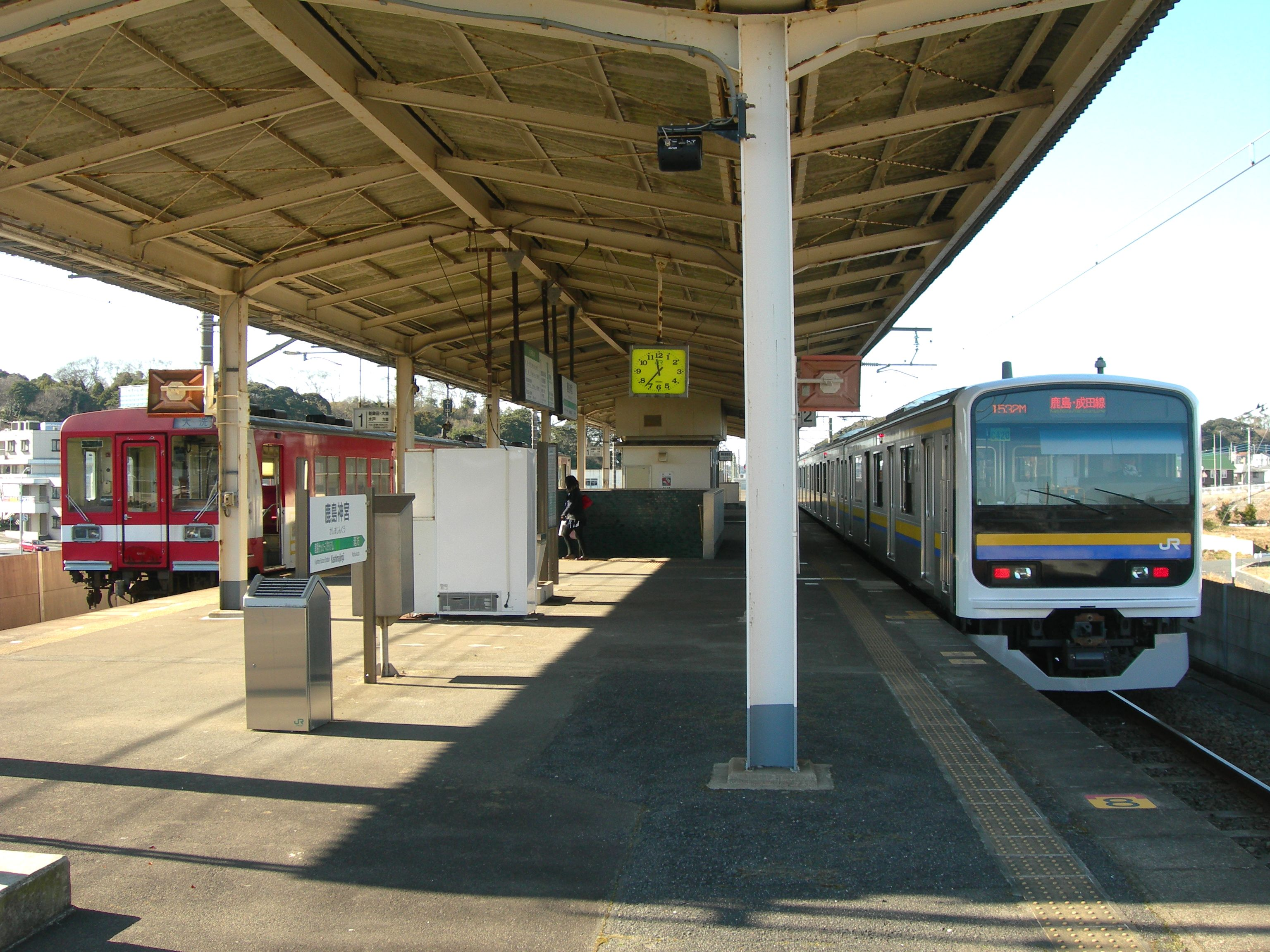 鹿島神宮駅ホーム